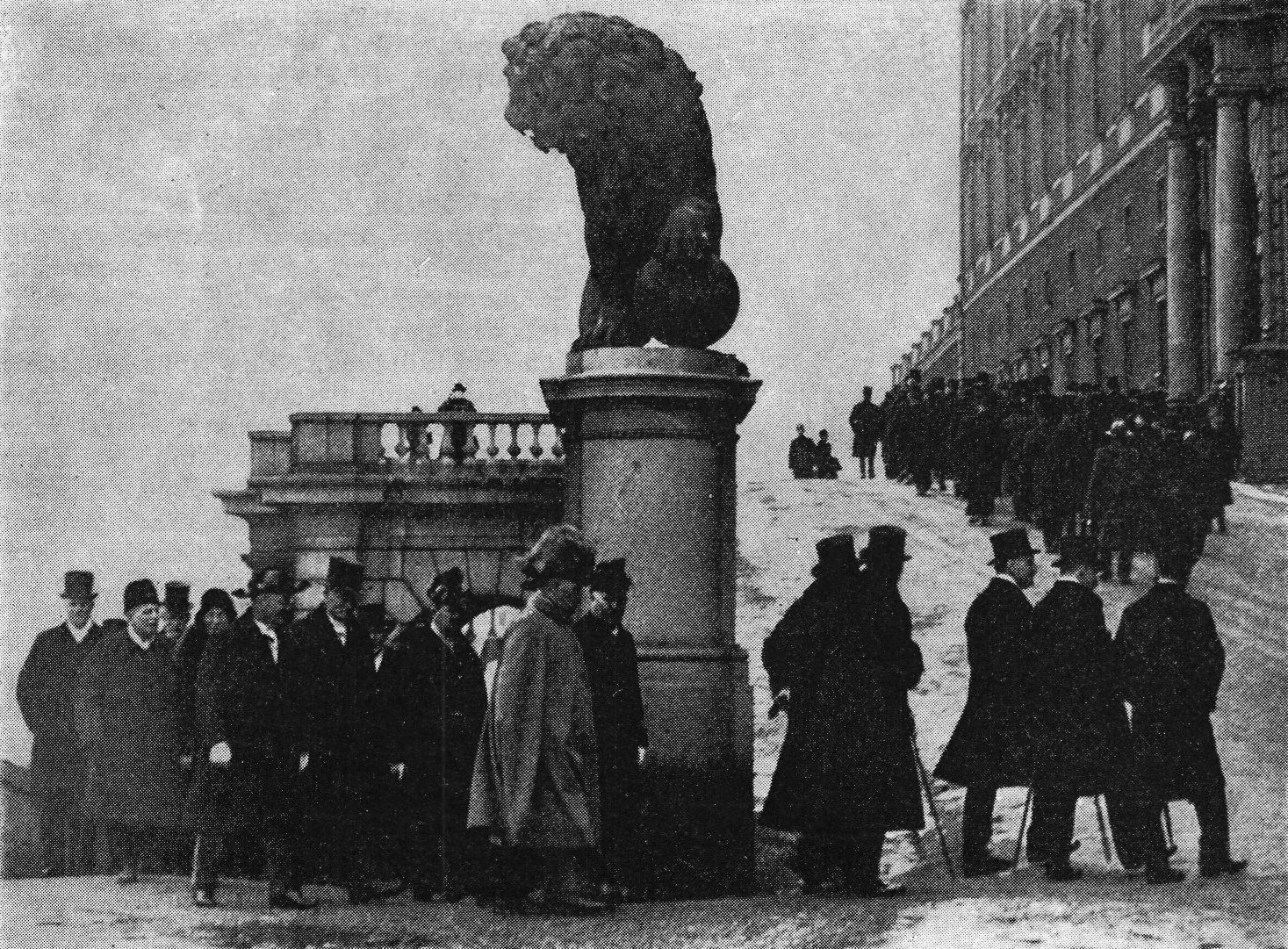 Riksdagsmännen på väg till rikssalen inför riksdagens högtidliga öppnande 1932.